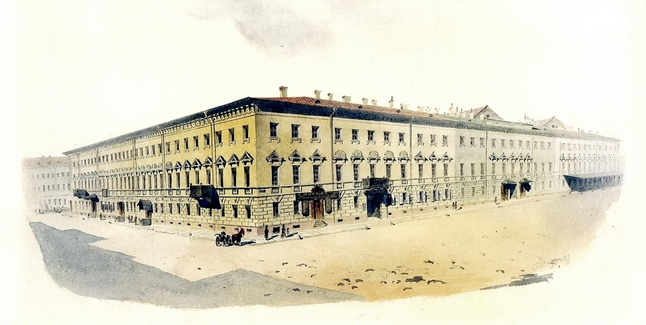 Акварель 1860-х, на которой изображён Дом Жако в Санкт-Петербурге